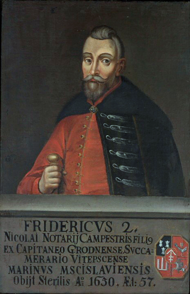 Беларуская (тарашкевіца): Партрэт Фрыдэрыка Сапегі (Fryderyk Sapieha) гербу «Ліс» (каля 1584 — 1650), дзяржаўнага дзеяча Вялікага Княства Літоўскага, ваяводы амсьціслаўскага